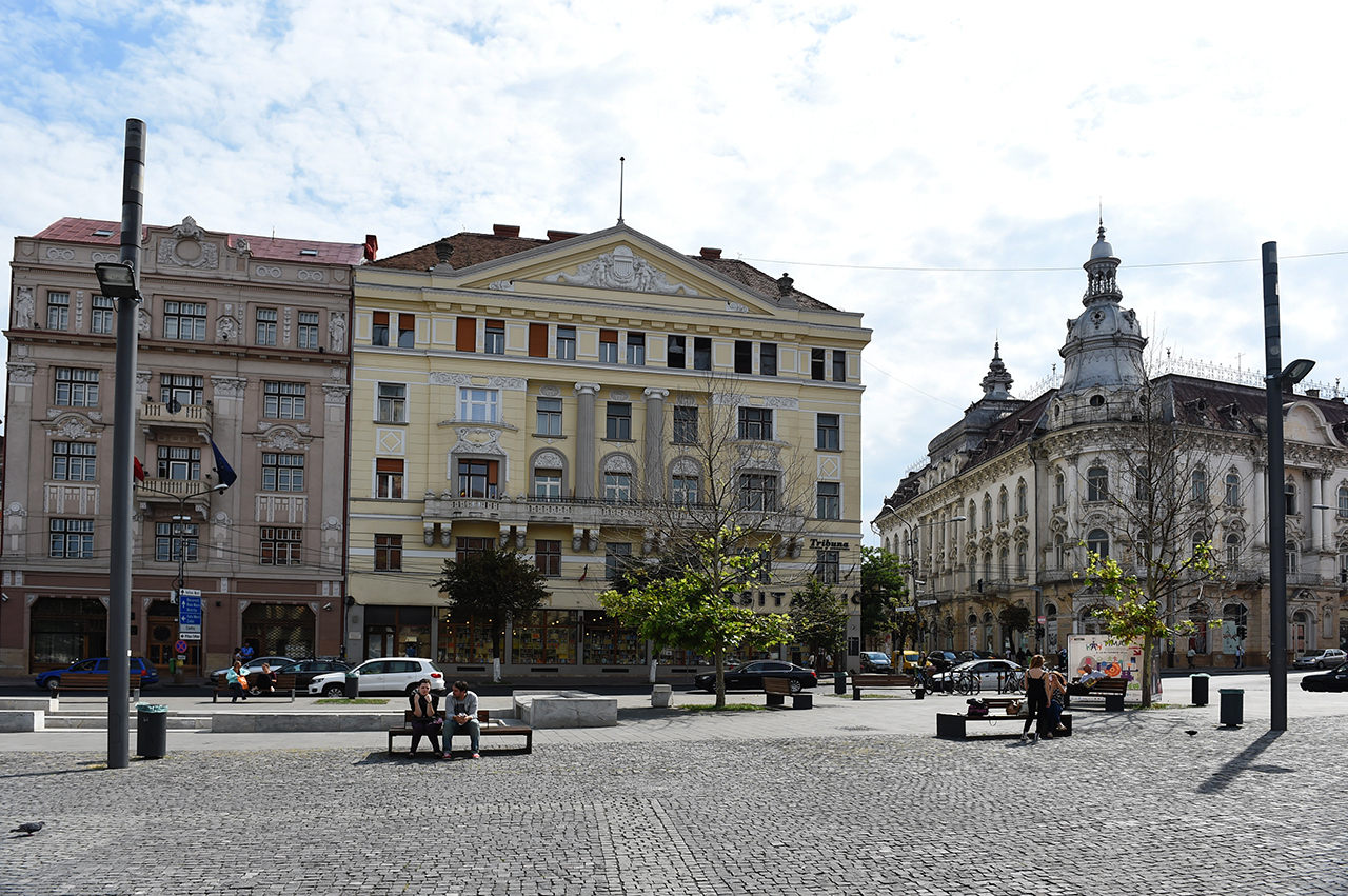 Piata Unirii Cluj